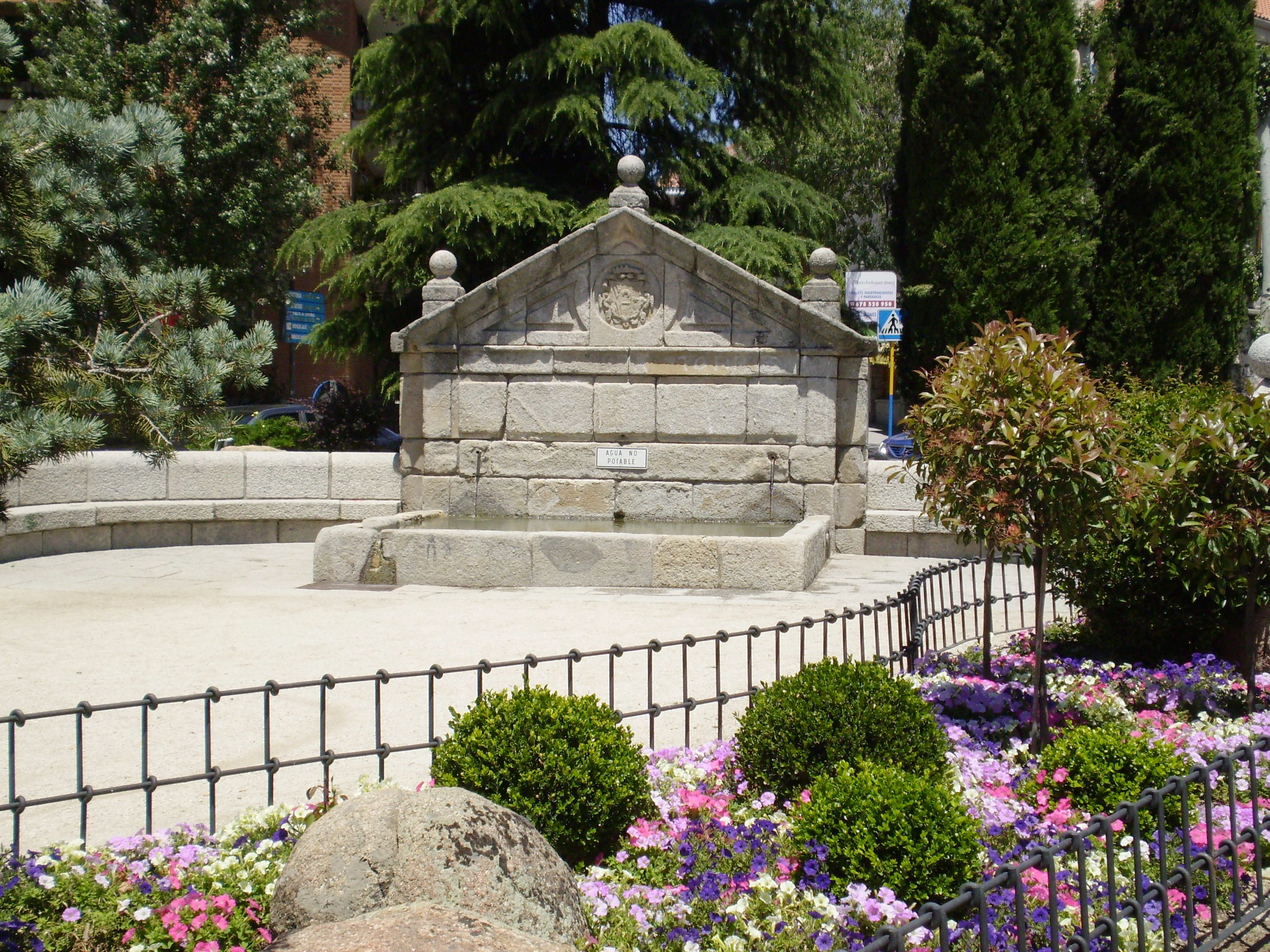 Fuente de El Caño. Torrelodones, Madrid, Spain